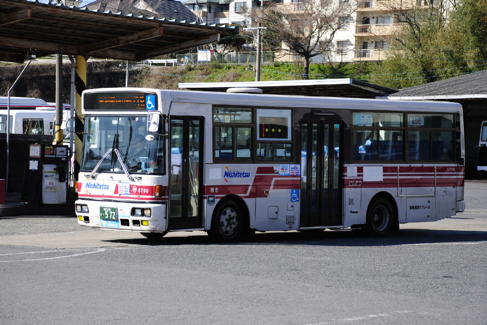 宗像西鉄タクシー車 赤間営業所にて